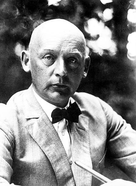 Wilhelm Pinder (1878 - 1947), Kunsthistoriker, Deutschland